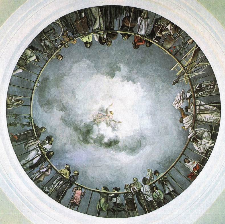 Veduta dell'affresco realizzato nel 1982